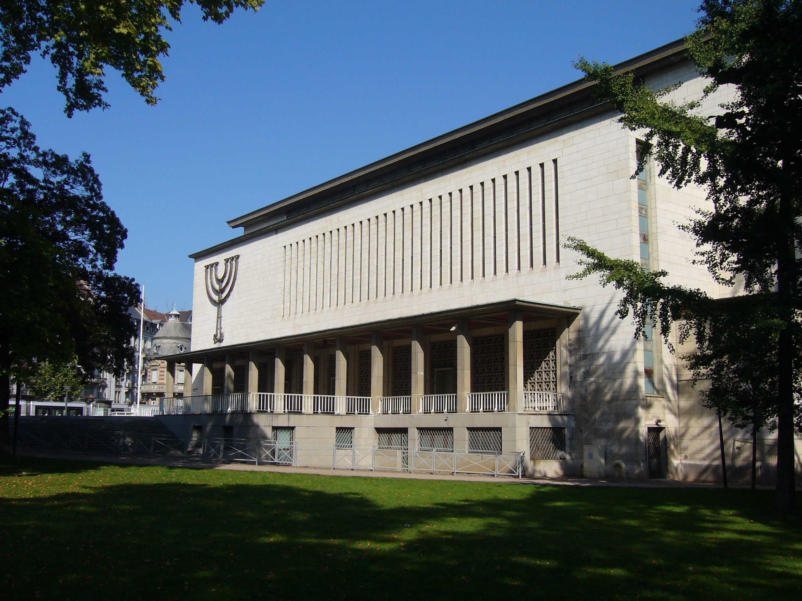 La synagogue